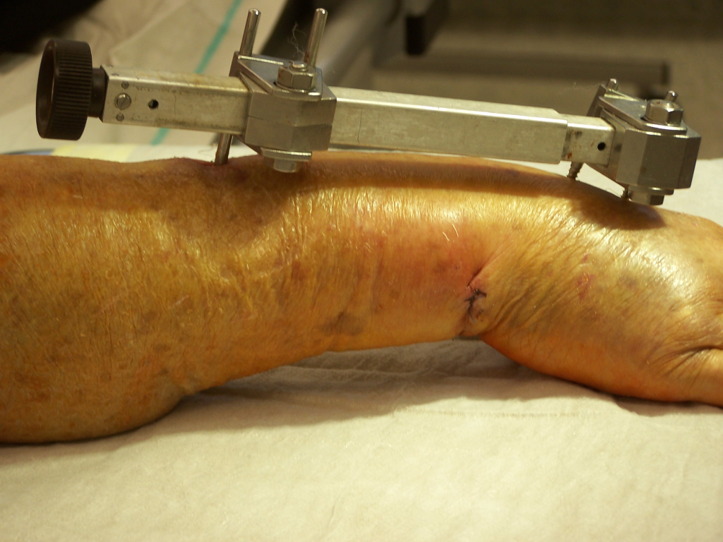 Fixateur externe, Handgelenk überbrückt (2)